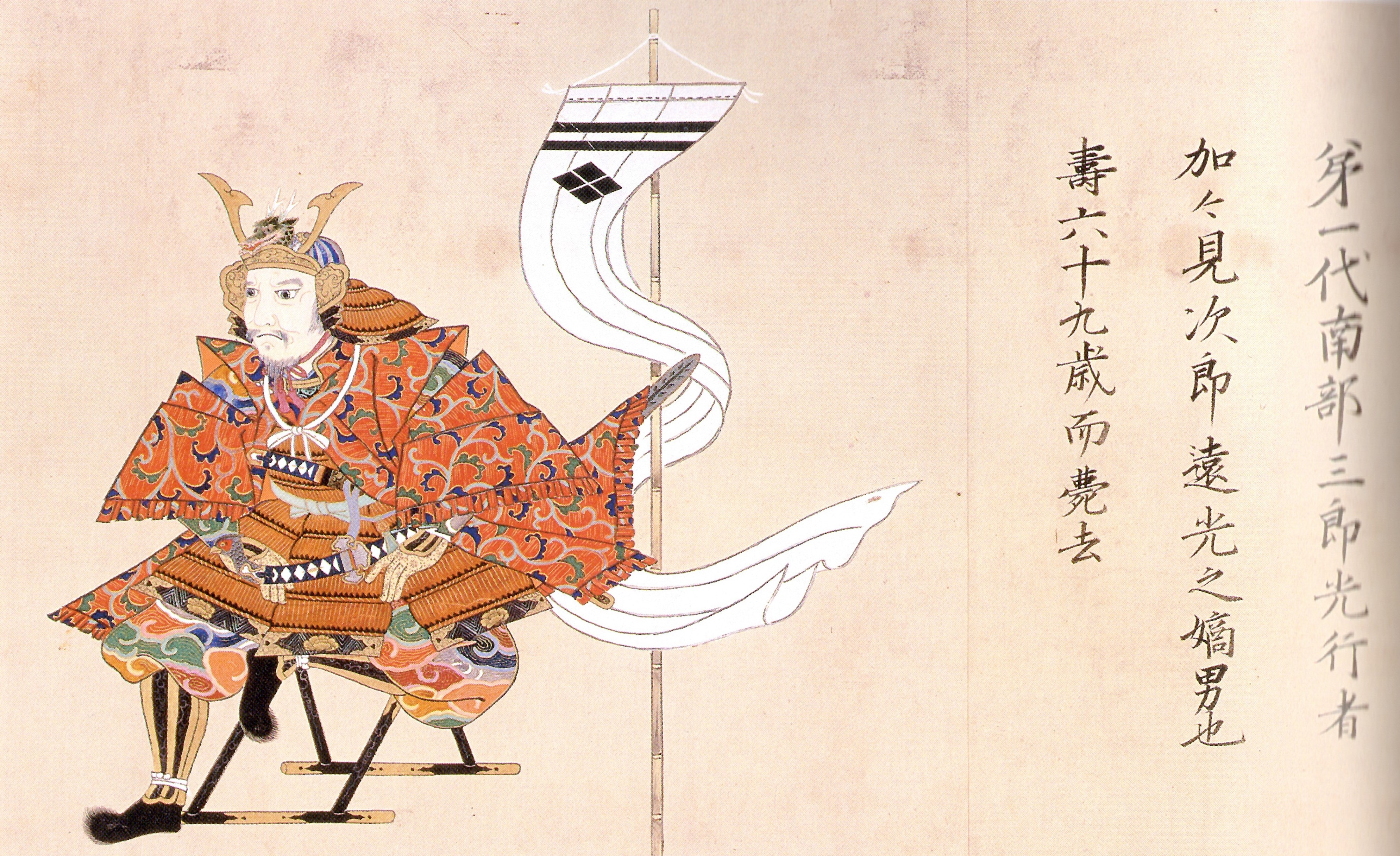 南部光行の肖像。